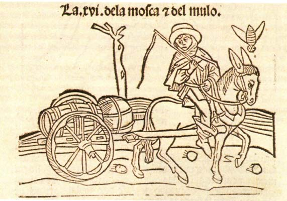 Isopete